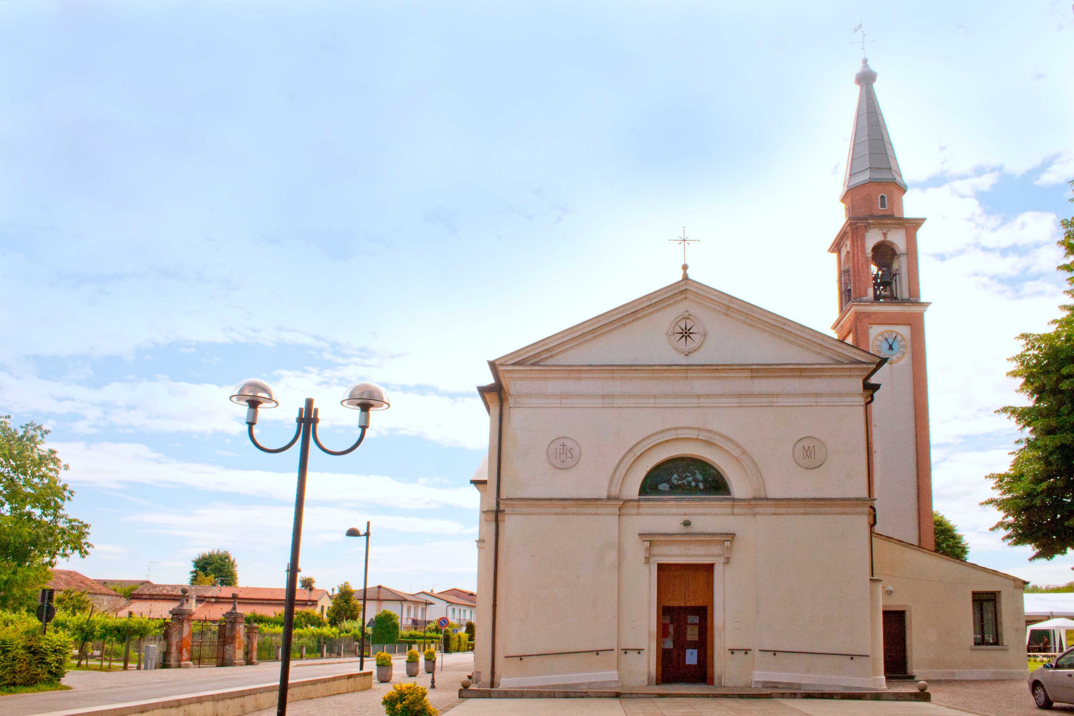 Chiesa di Santa Maria di Veggiano Padova